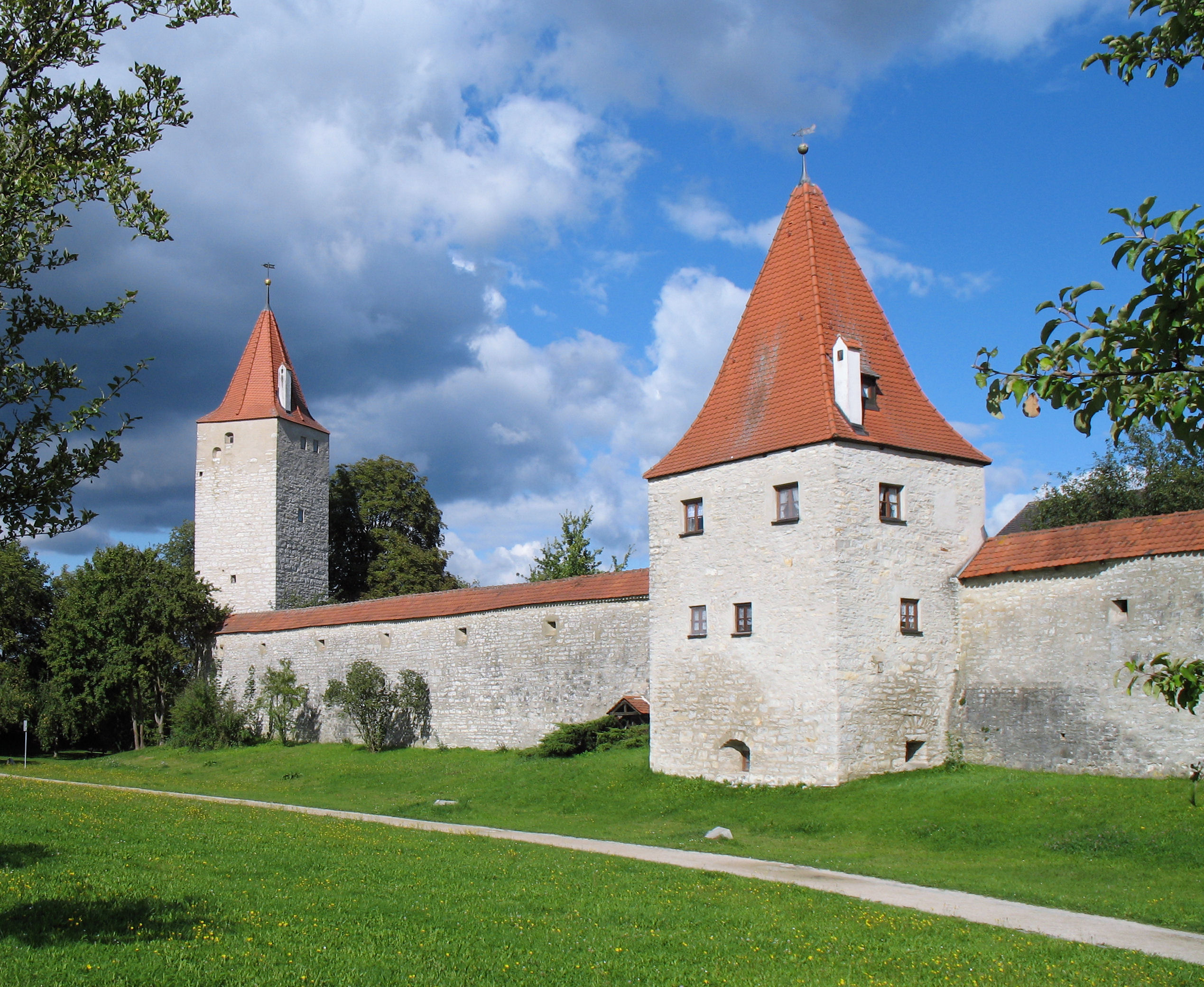 Teil der Stadtmauer von Berching